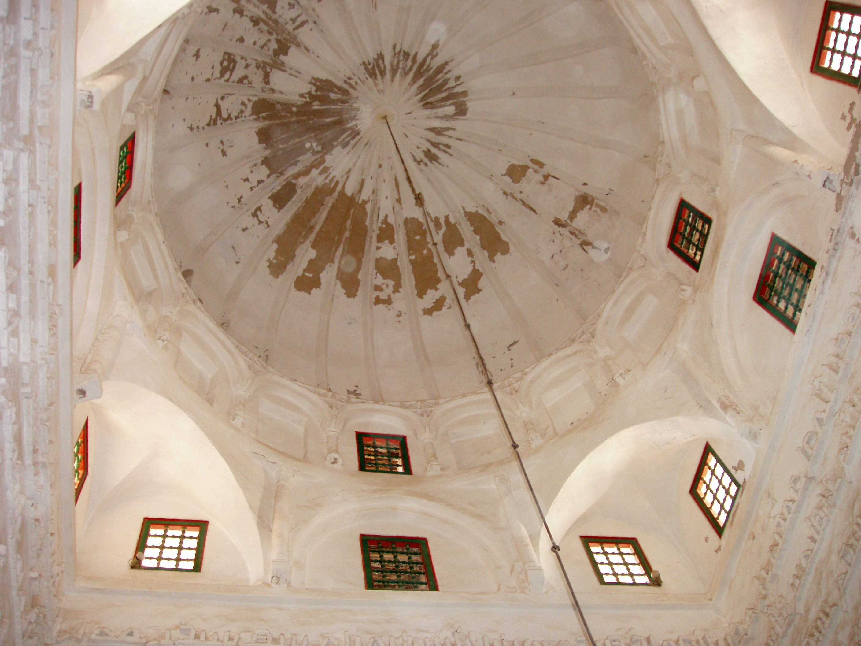 Zaouia Sidi Amor Abbada dome